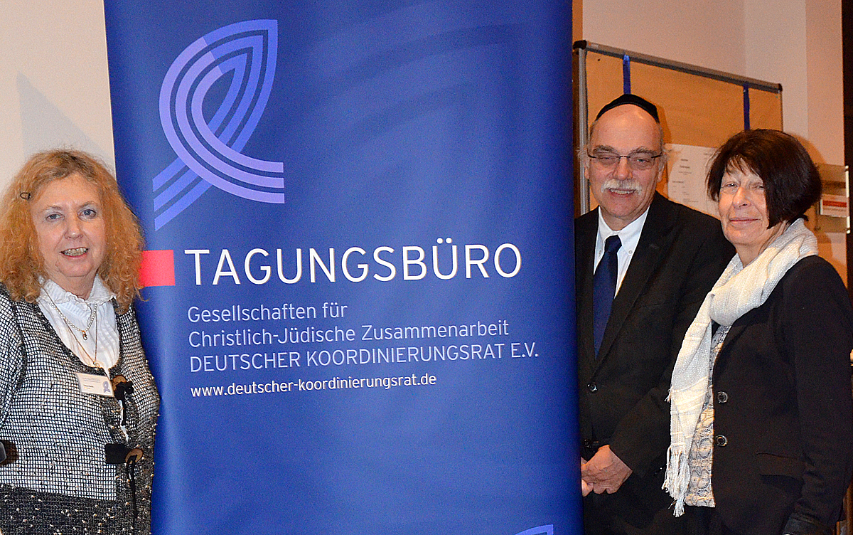 Teilnehmer der Studientagung Um Gottes Willen - Religion in säkularer Gesellschaft in Hannover, veranstaltet vom Deutscher Koordinierungsrat der Gesellschaften für Christlich-Jüdische Zusammenarbeit im InterCityHotel Hannover vom 09. - 10. Oktober 2015 (von links): Die Autorin Petra Kunik, Prof. Dr. Andreas Nachama, Dr. phil. Eva-Maria Schulz-Jander ...